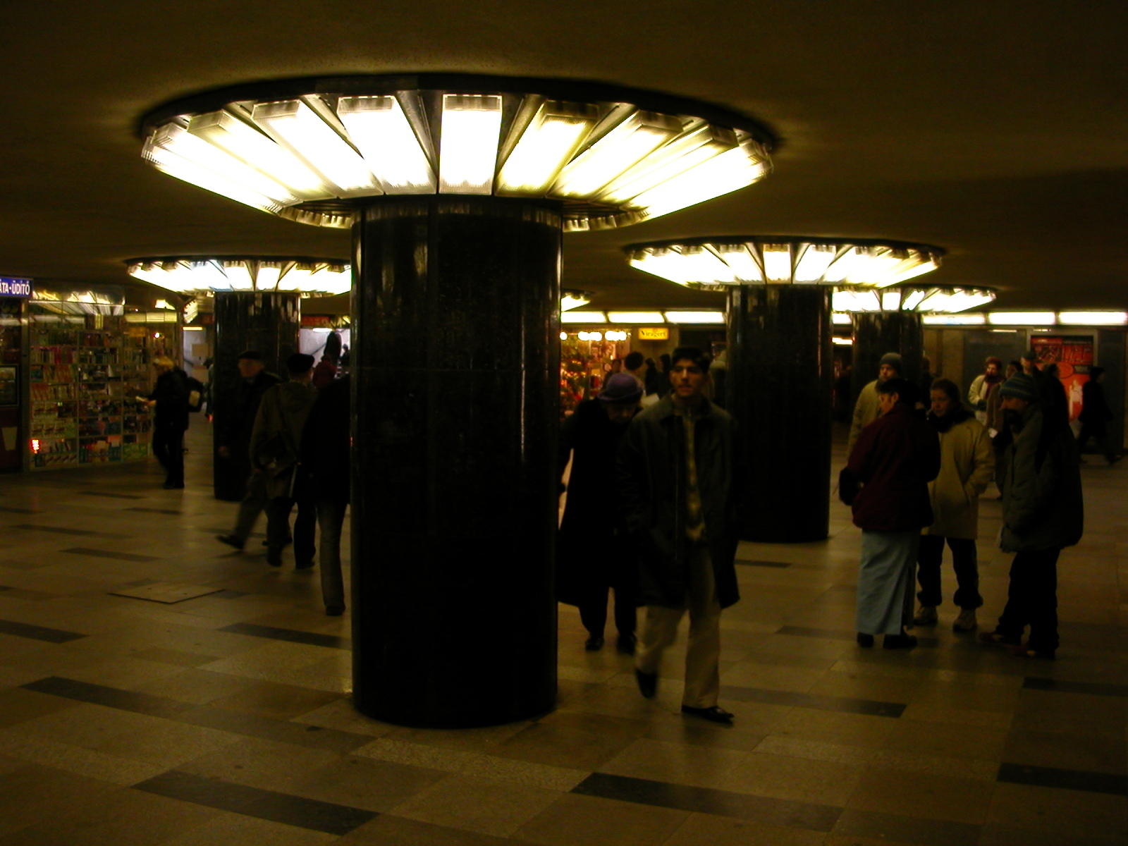 Astoria station (Budapest metro)